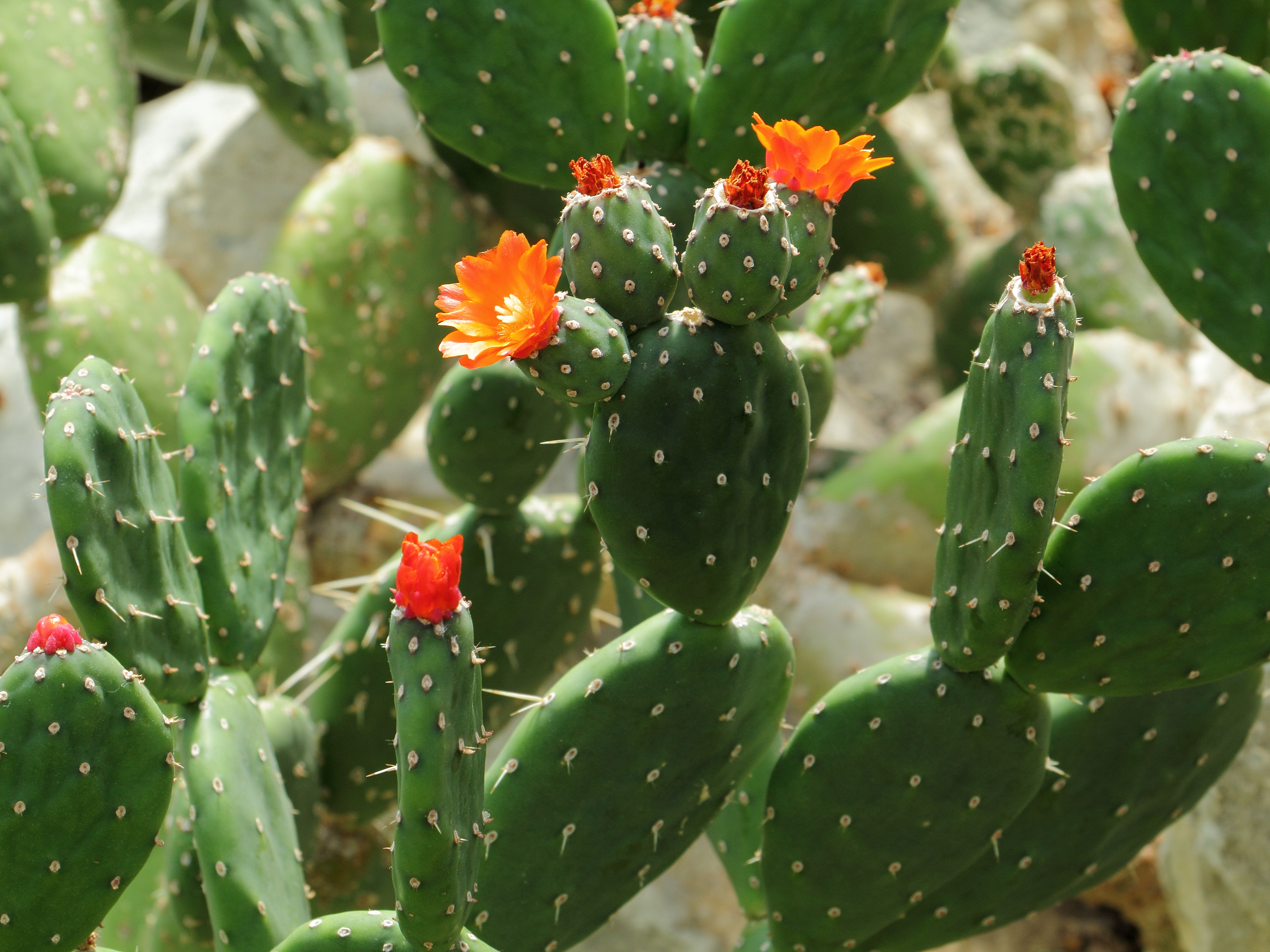 Opuntia quitensis, indetifierad med hjälp av skylt i Kew Gardens, London.